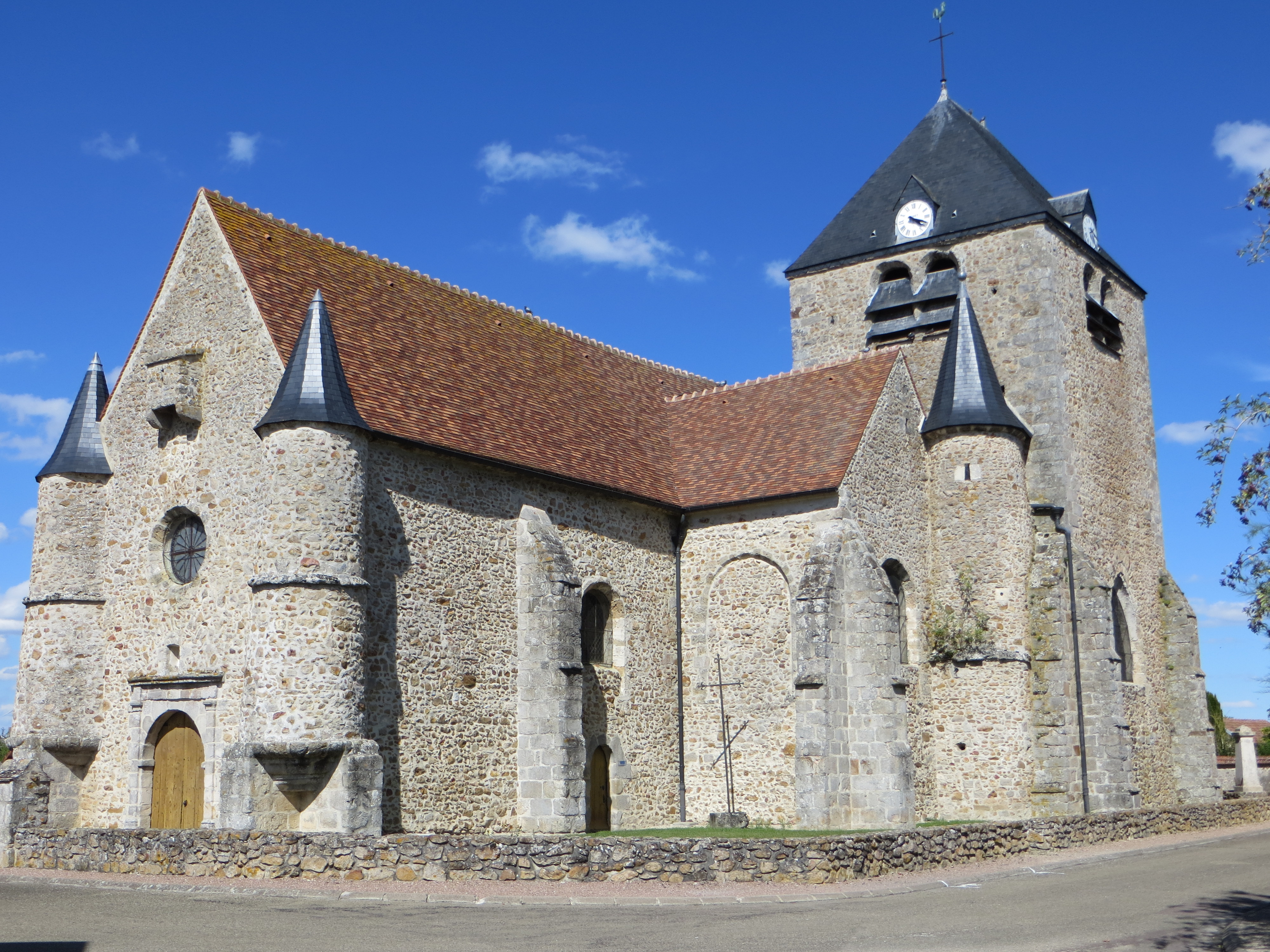 Vue de l'église